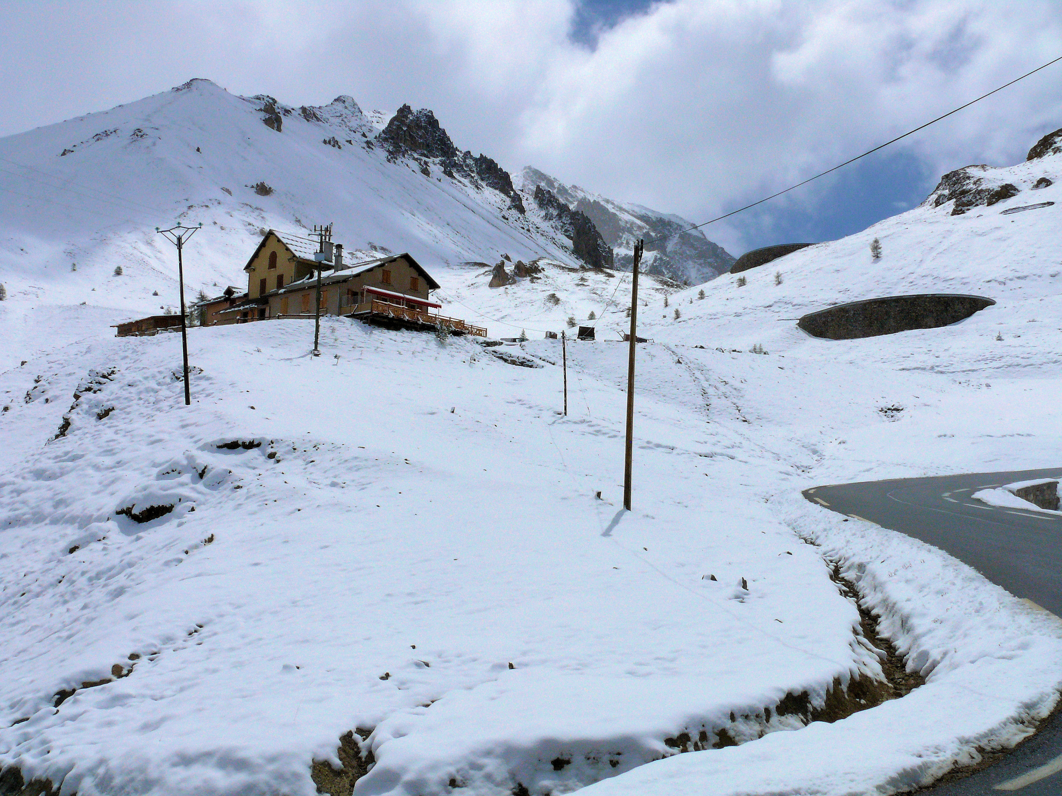 Cervières (Hautes-Alpes) - Route des Grandes Alpes - Le refuge Napoléon avant le col d'Izoard début juin